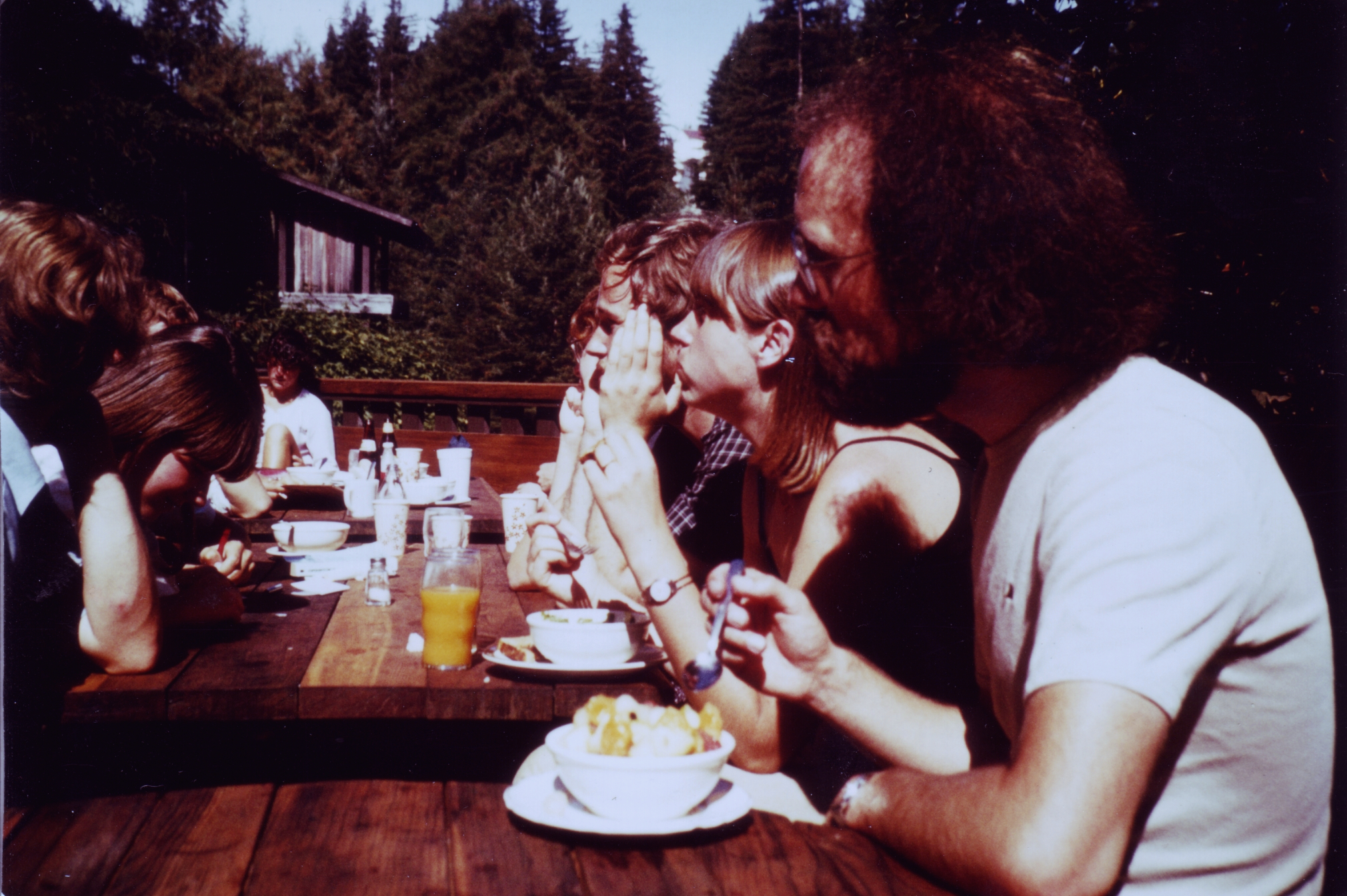 delegacio de GEJ en la universitato de Kalifornio en Santa Cruz dum la jaro 1983 (antaŭe maldekstre Franz Kruse)